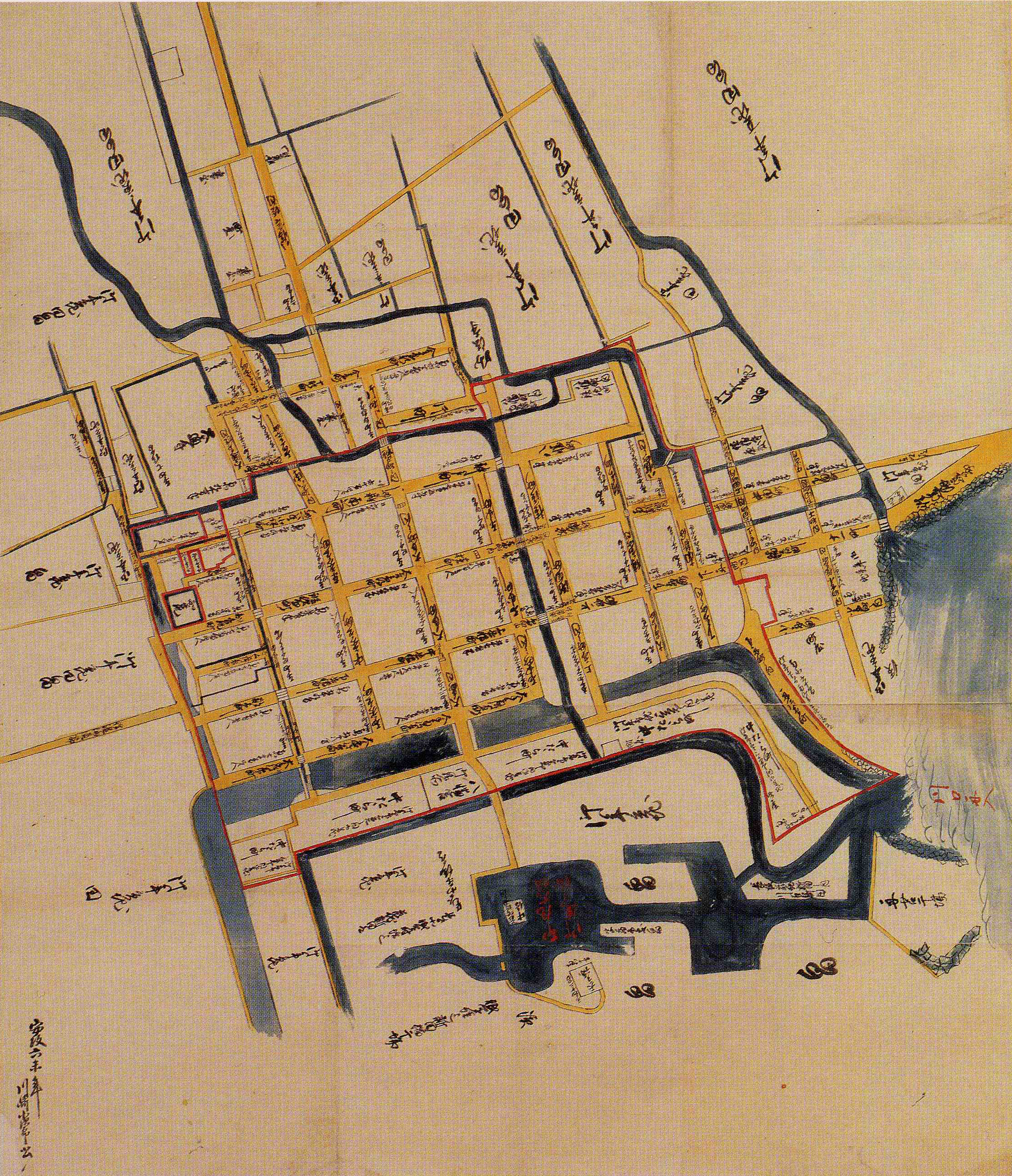 長浜町絵図